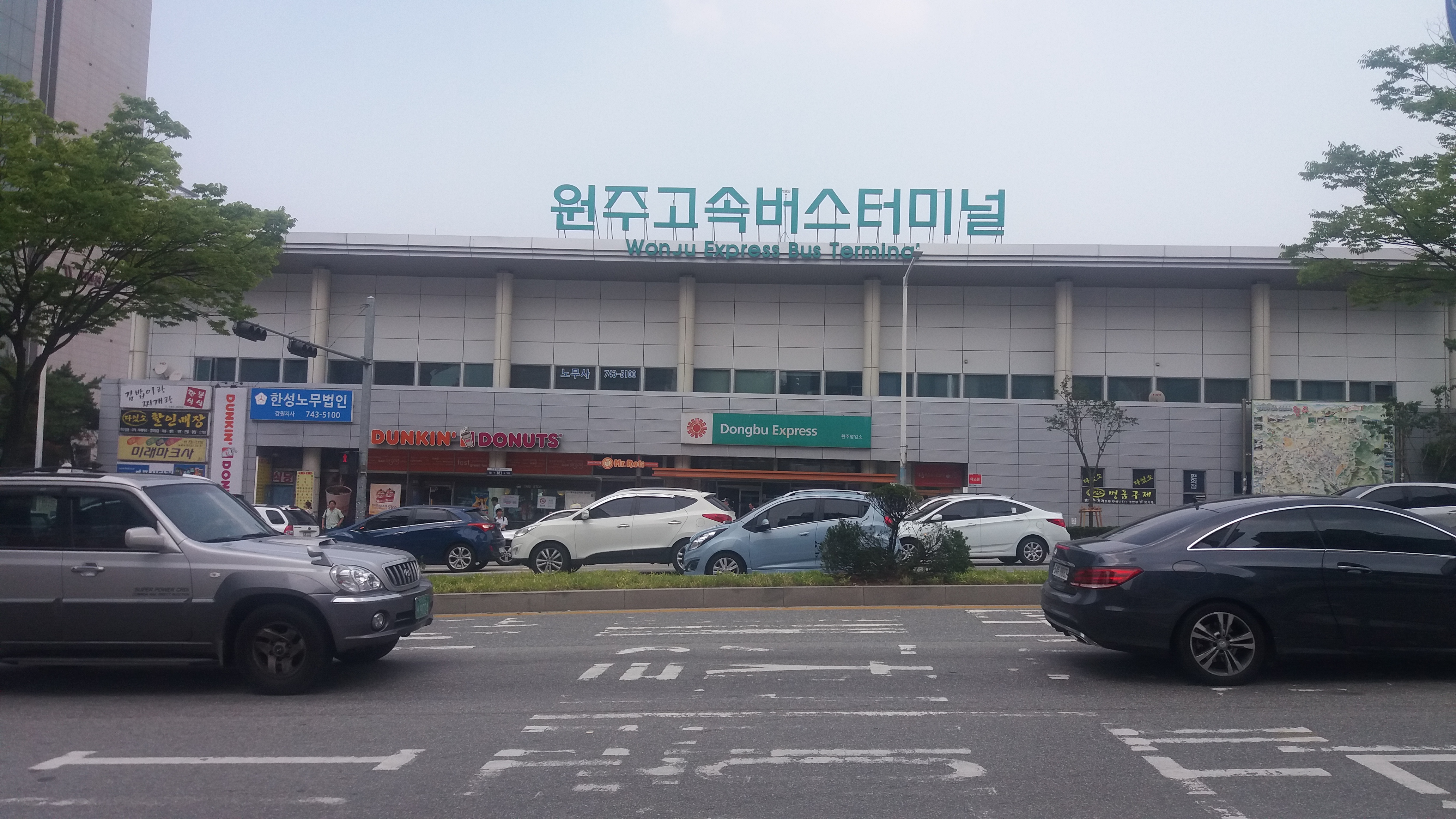 원주고속버스터미널